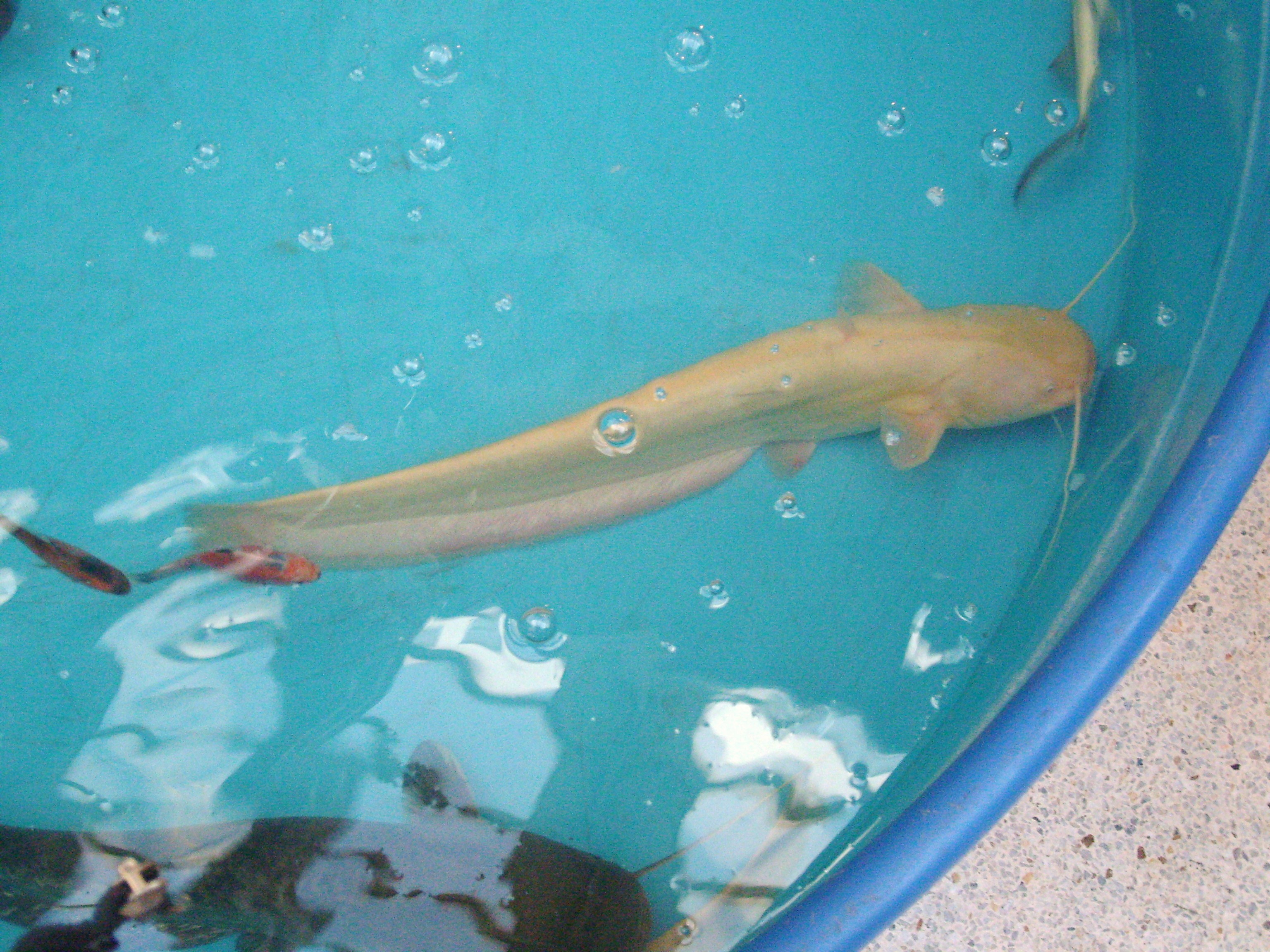 Sumec velký (albín) v bazénku na veletrhu Petrův zdar.